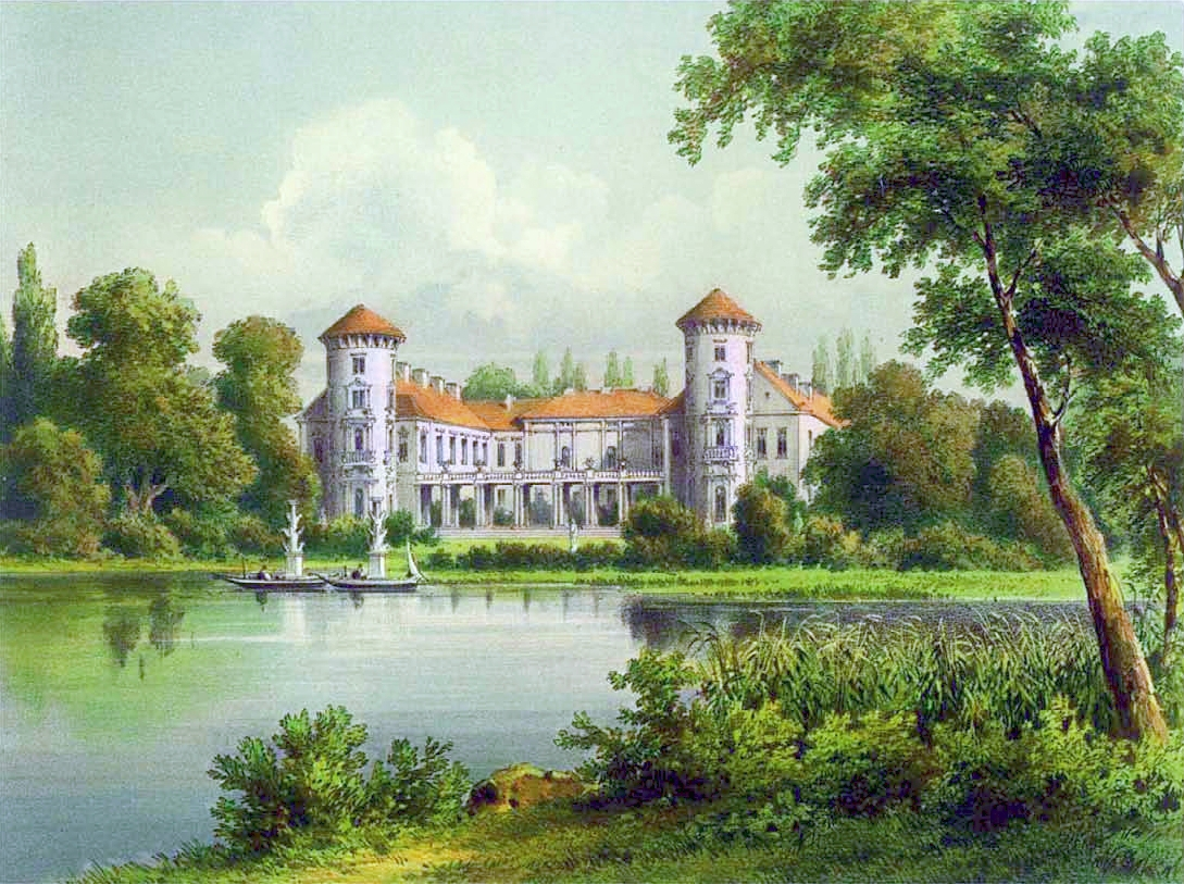 Lithographie des Schlosses Rheinsberg